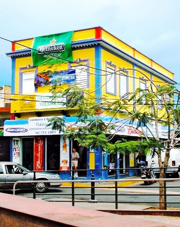 Cantina across from “Plaza del Mercado” in Campo Alegre, Santurce, Puerto Rico